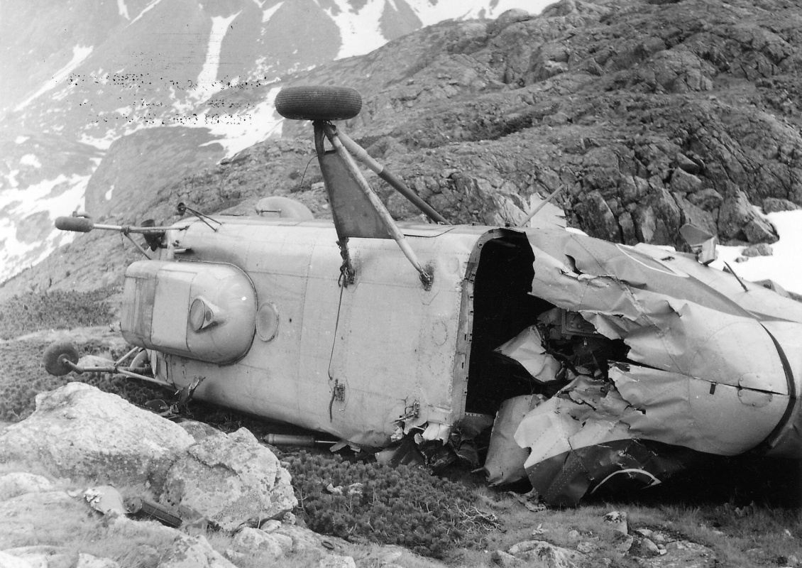 Havária Mi-4 vo Vysokých Tatrách v roku 1969